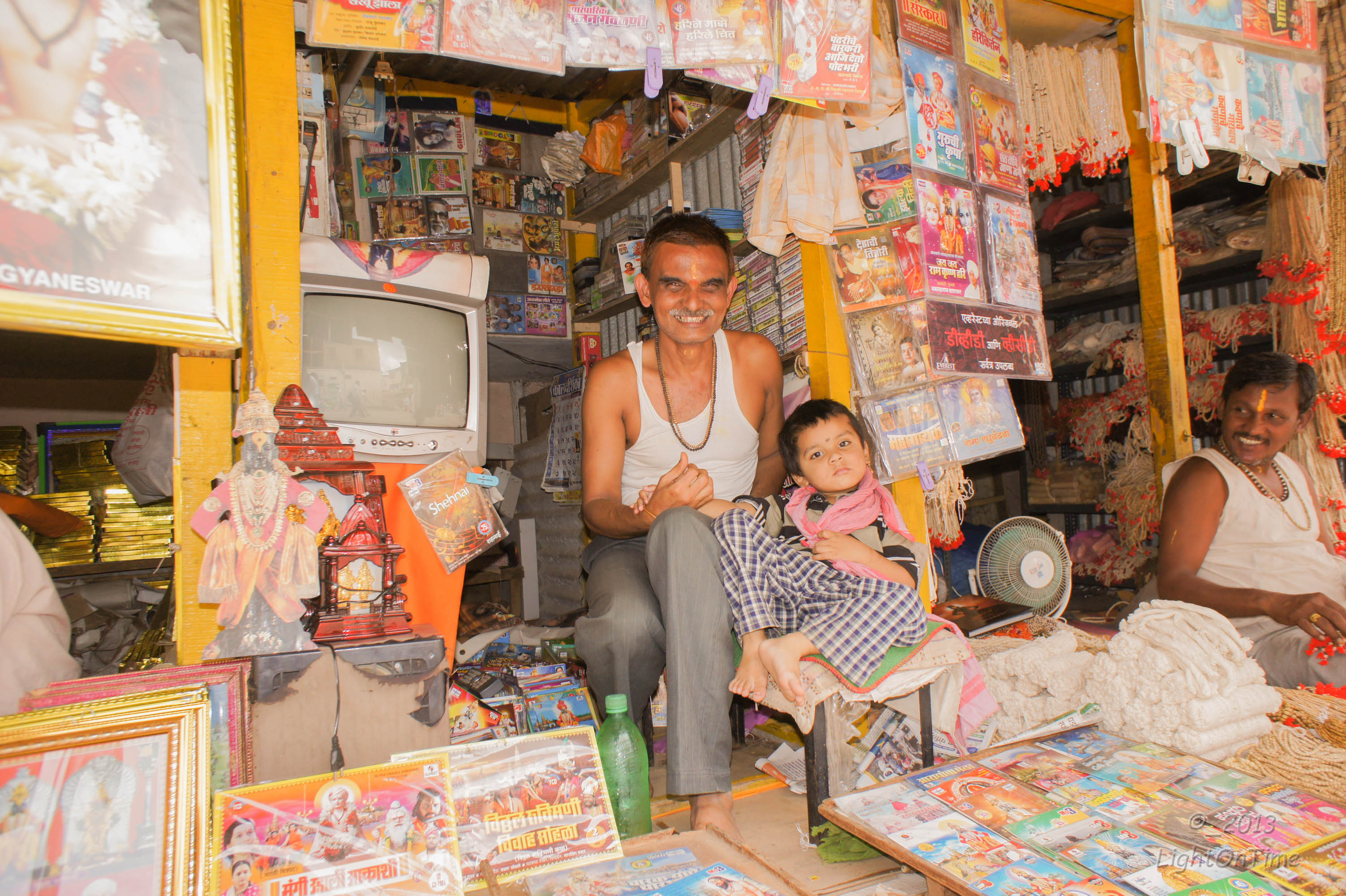 Pandharpur_2013_Aashad